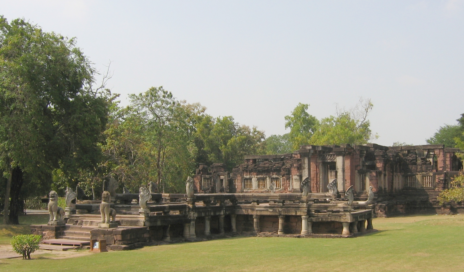 Naga bridge at Prasat Hin Phimai, Thailand